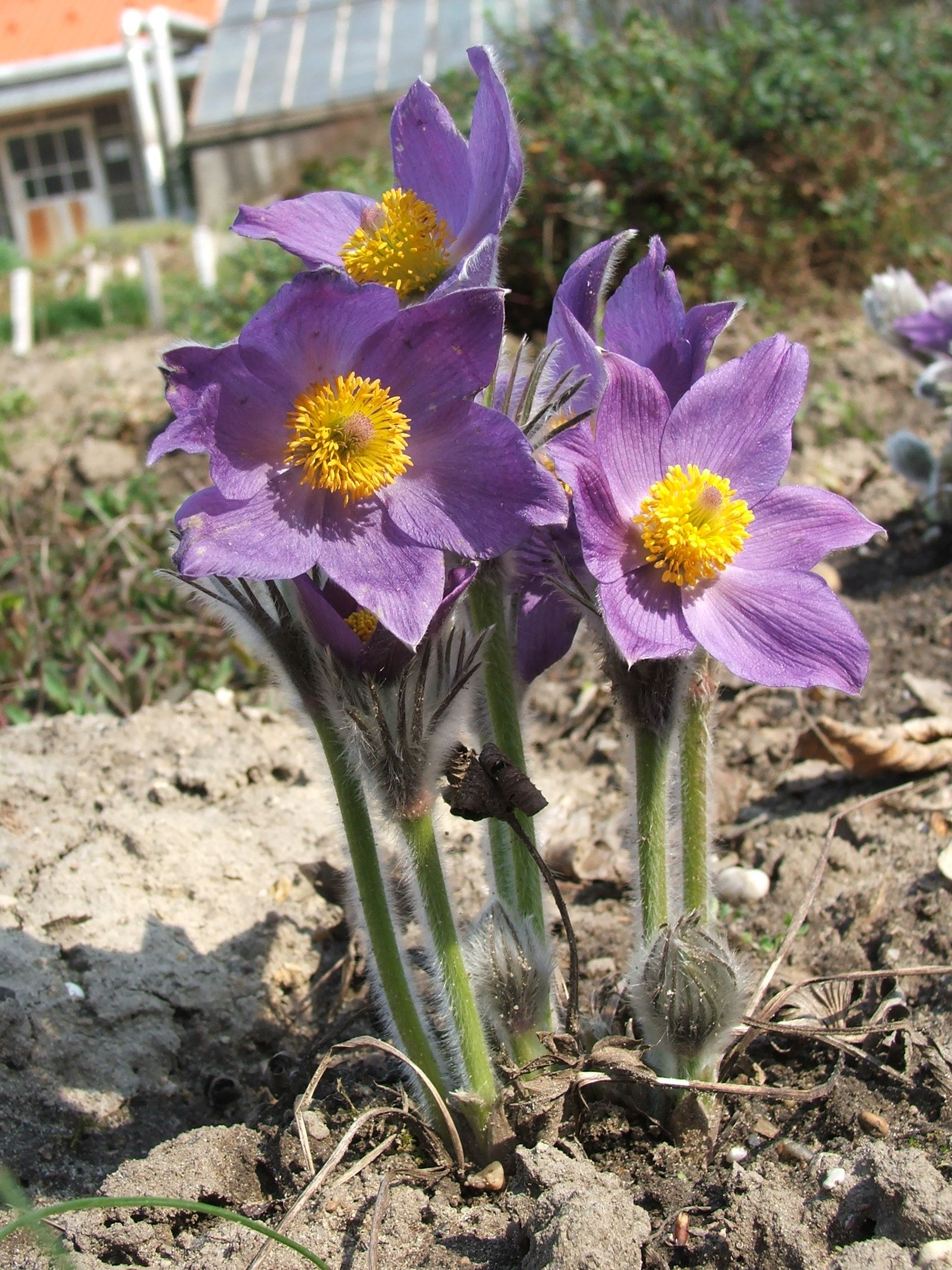 Pulsatilla patens, MTA Botanic Garden (Hungary)